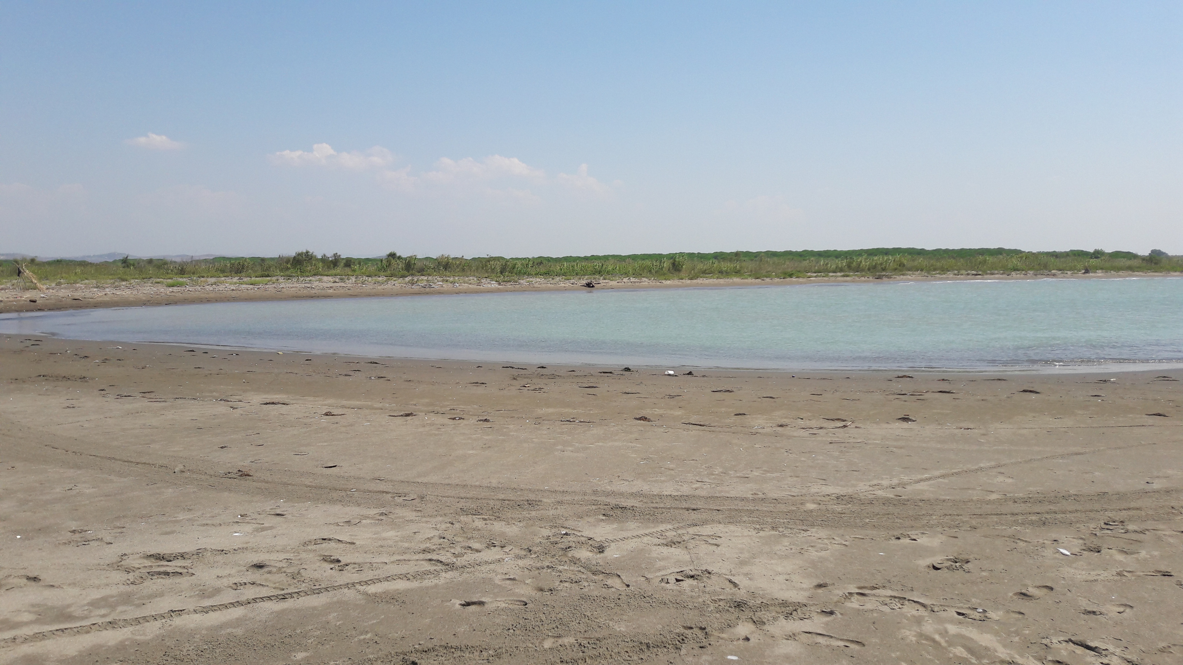 Lumi Shkumbin